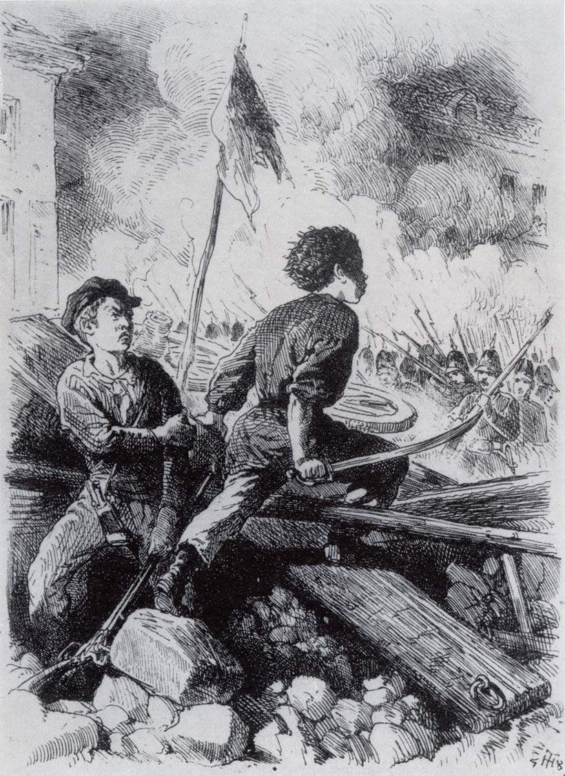 Der 20jährige Schlossergeselle Heinrich Glasewaldt und der 17-jährige Schlosserlehrling Ernst Zinna 1848 auf der Barrikade an der Ecke Jäger-/Friedrichstraße. Federlithografie.